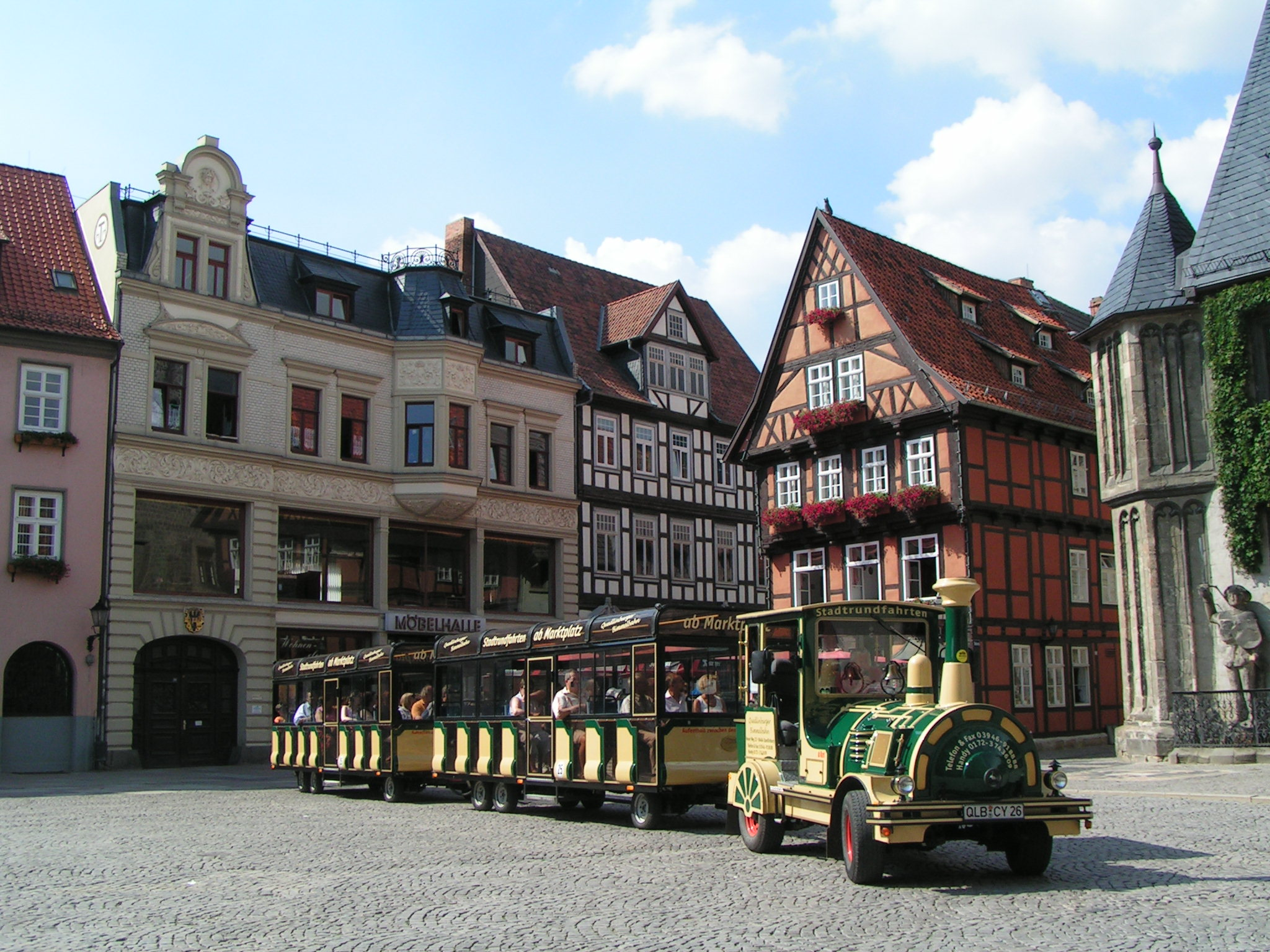 Wegebahn auf dem Marktplatz von Quedlinburg (2006)